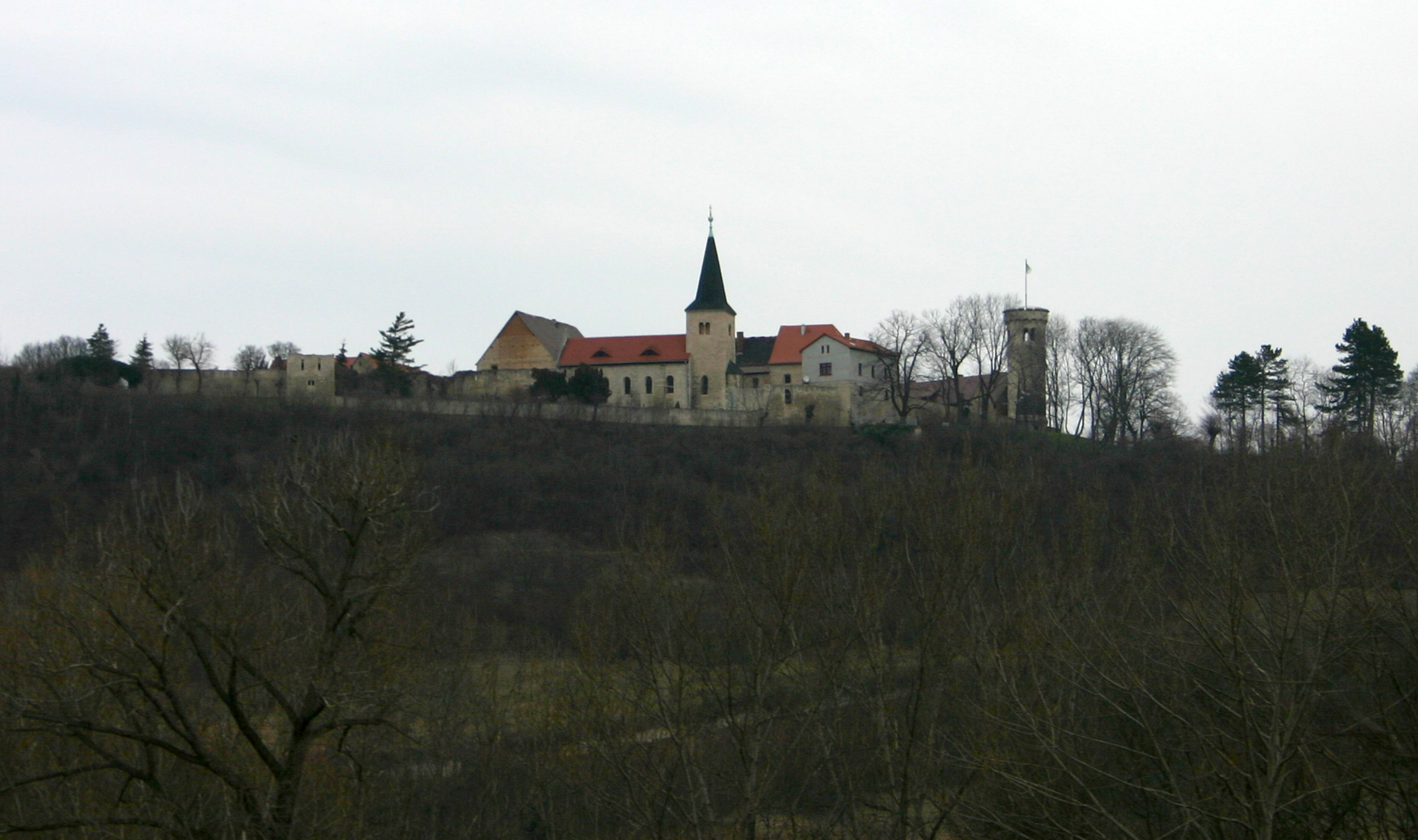 Gut Zscheiplitz gegenüber der Neuenburg bei Freiburg an der Unstrut